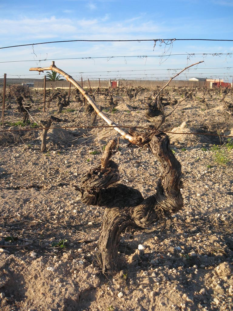 Cepa podada según el sistema de vara y pulgar propio del Marco de Jerez, en Sanlúcar de Barrameda